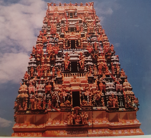 இராஜ கோபுரத்தின் கம்பீரத் தோற்றம்